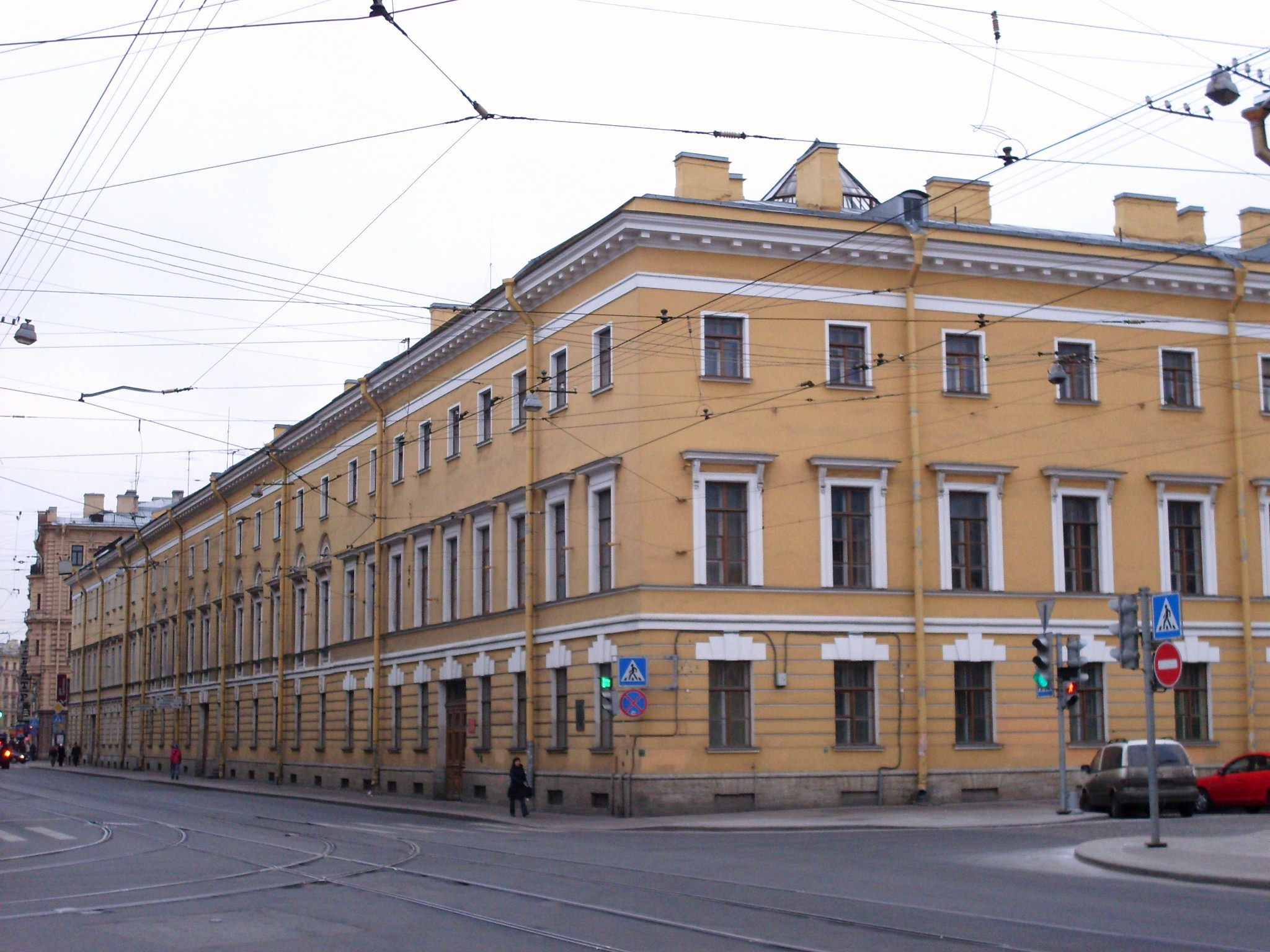 Sranantongo: Садовая 3, Петербург